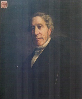 portrait Victor Frerejean